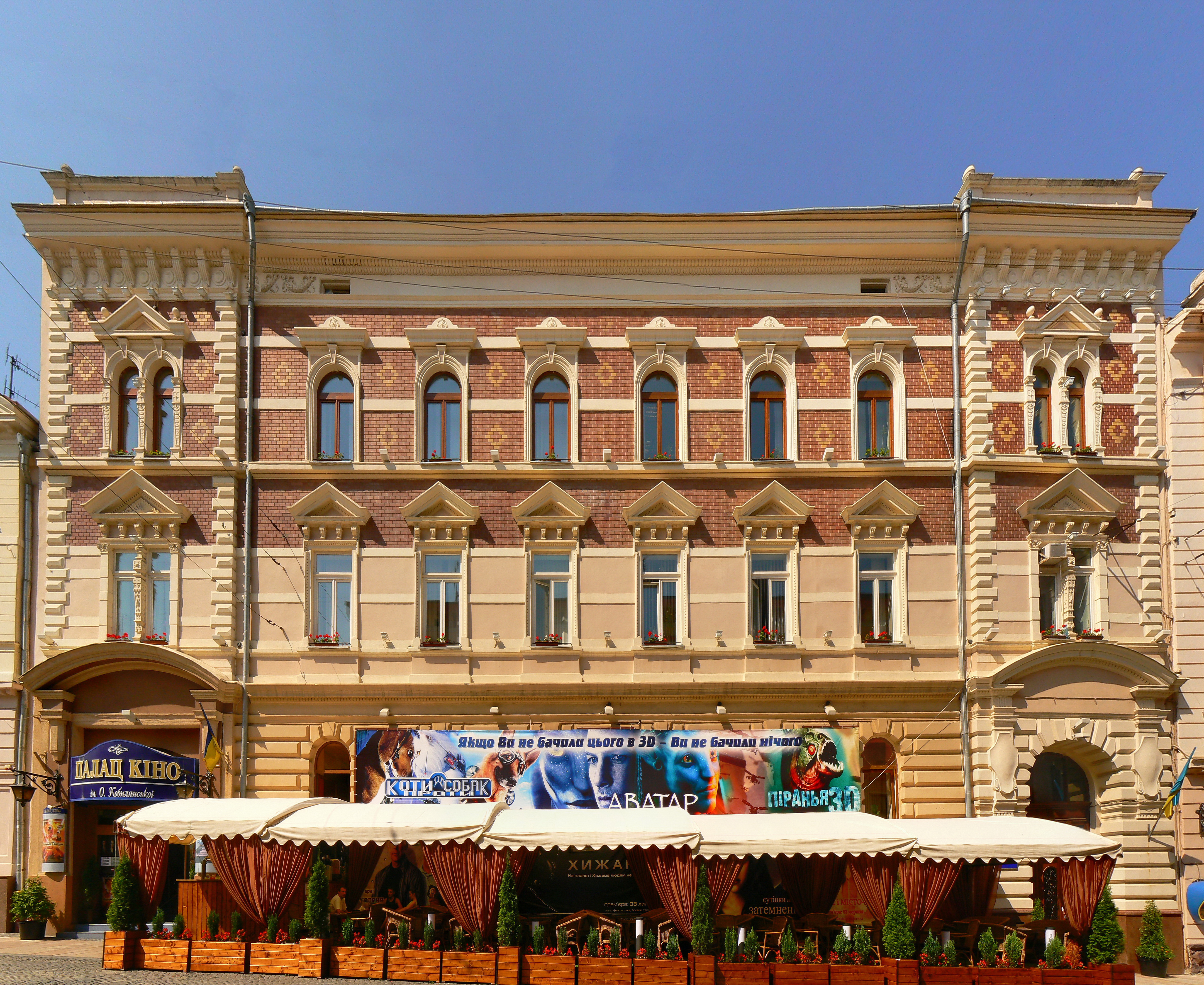 Кобилянської, 14